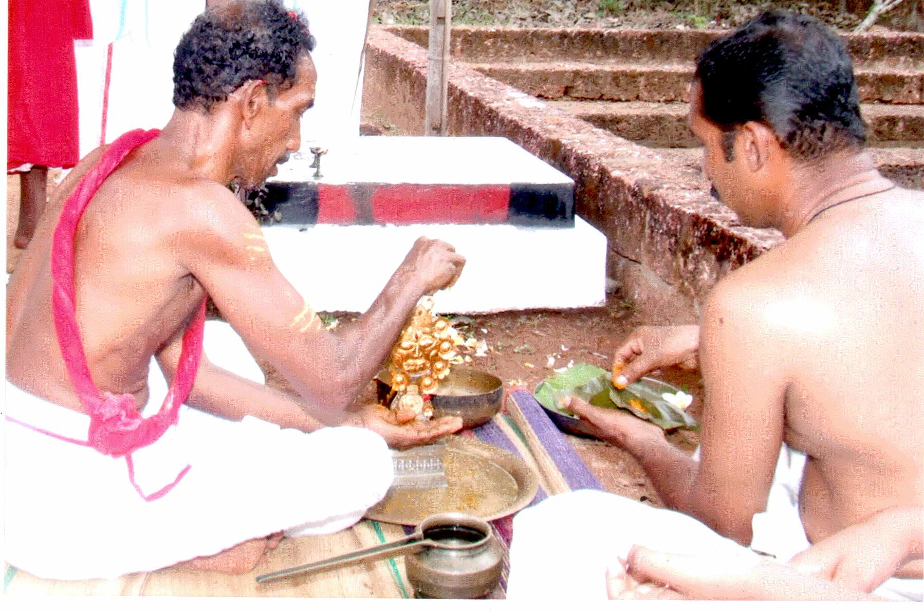 ബിംബപൂജ